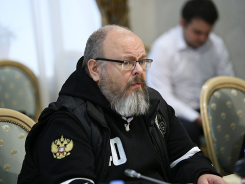 Руководитель движения «Сорок сороков» Андрей Кормухин рассказал об одном из проектов по воспитанию ответственного молодого поколения — об организации спортивных секций при православных храмах. Спорт популярен в молодежной среде, и стремление молодых людей быть сильными можно использовать в воспитании защитника Отечества и своей семьи, уверен Кормухин.